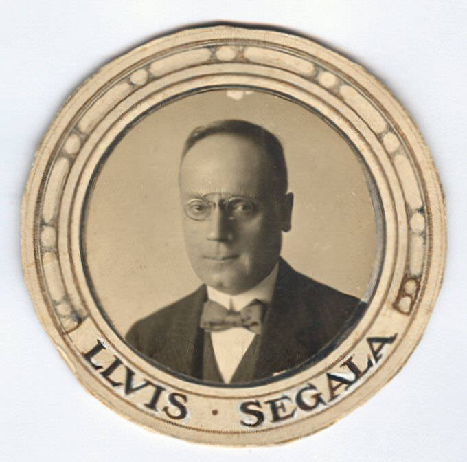 Retrat de Lluís Segalà, director de l'Escola Superior de Bibliotecàries (1919-1924) i de l'Escuela Superior para la Mujer (1925-1930), i professor de Llatí (1915-1930)